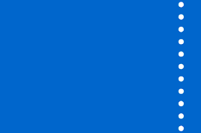 Vlag van Ourense